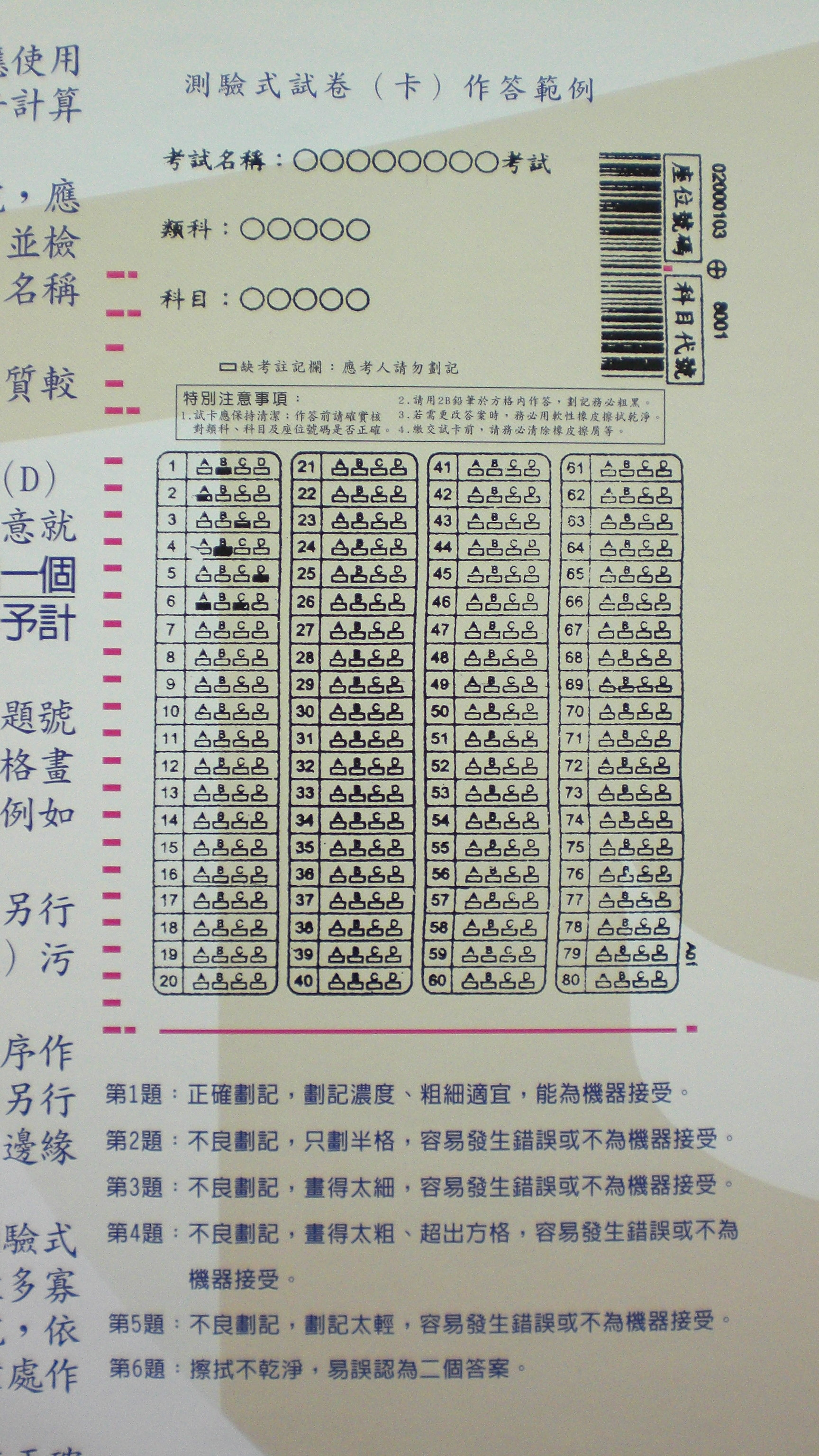 中華民國考選部國家考試測驗式試題答案卡作答範例2013年版